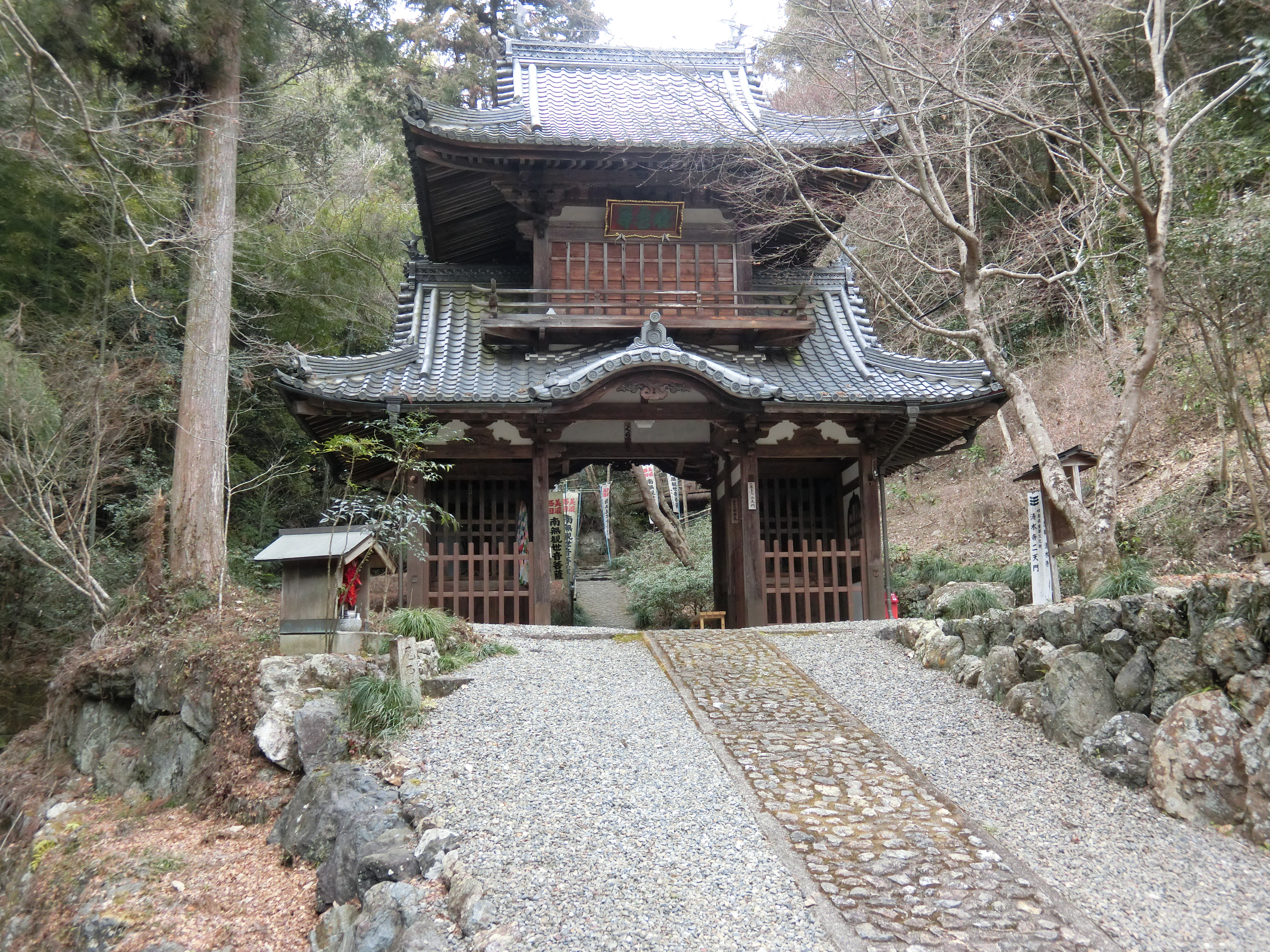 富加町の寺院、清水寺。美濃三十三観音霊場札所寺院。